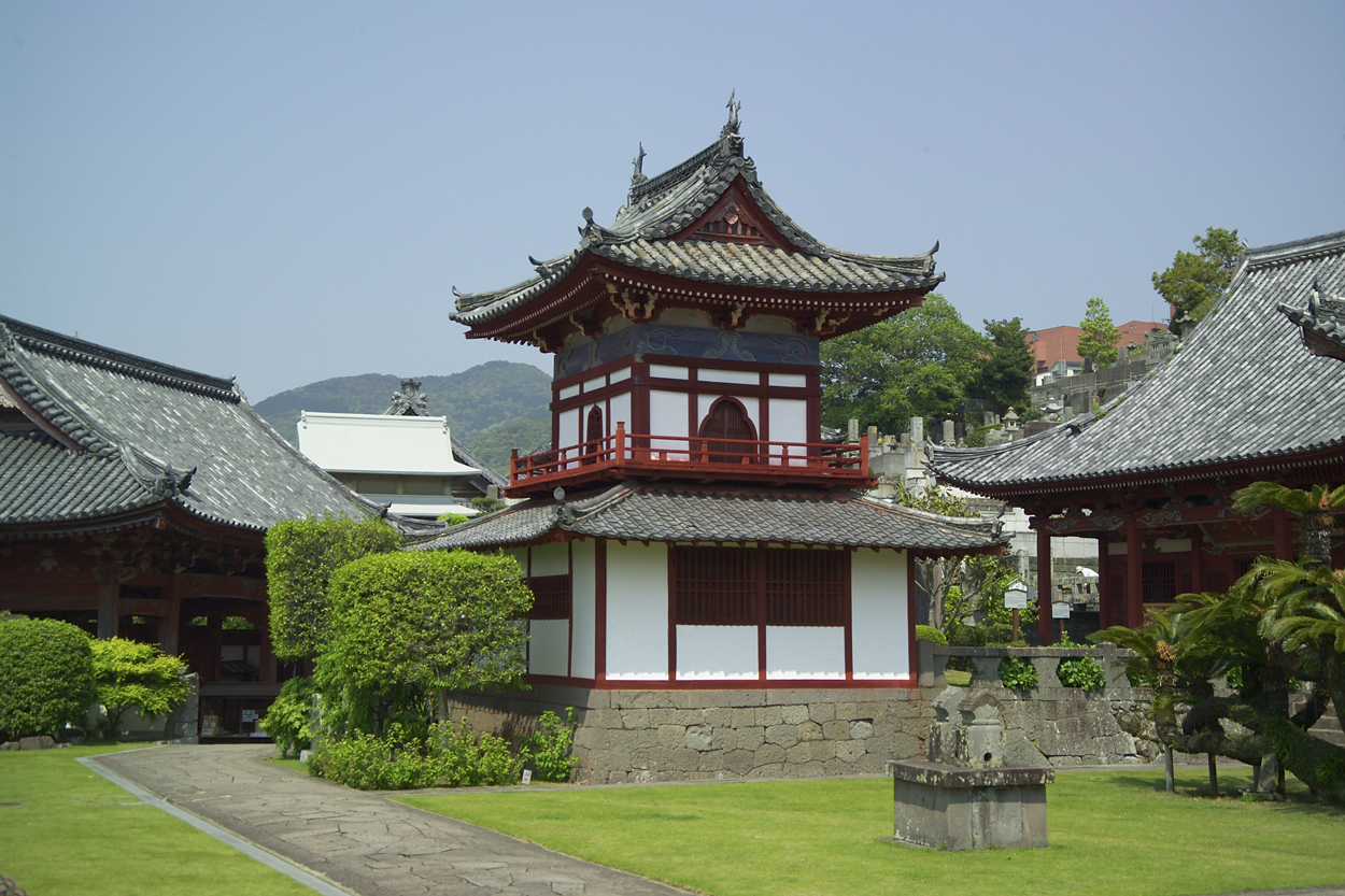 Bell and Drum Tower at Kōfuku-ji, Nagasaki, Japan